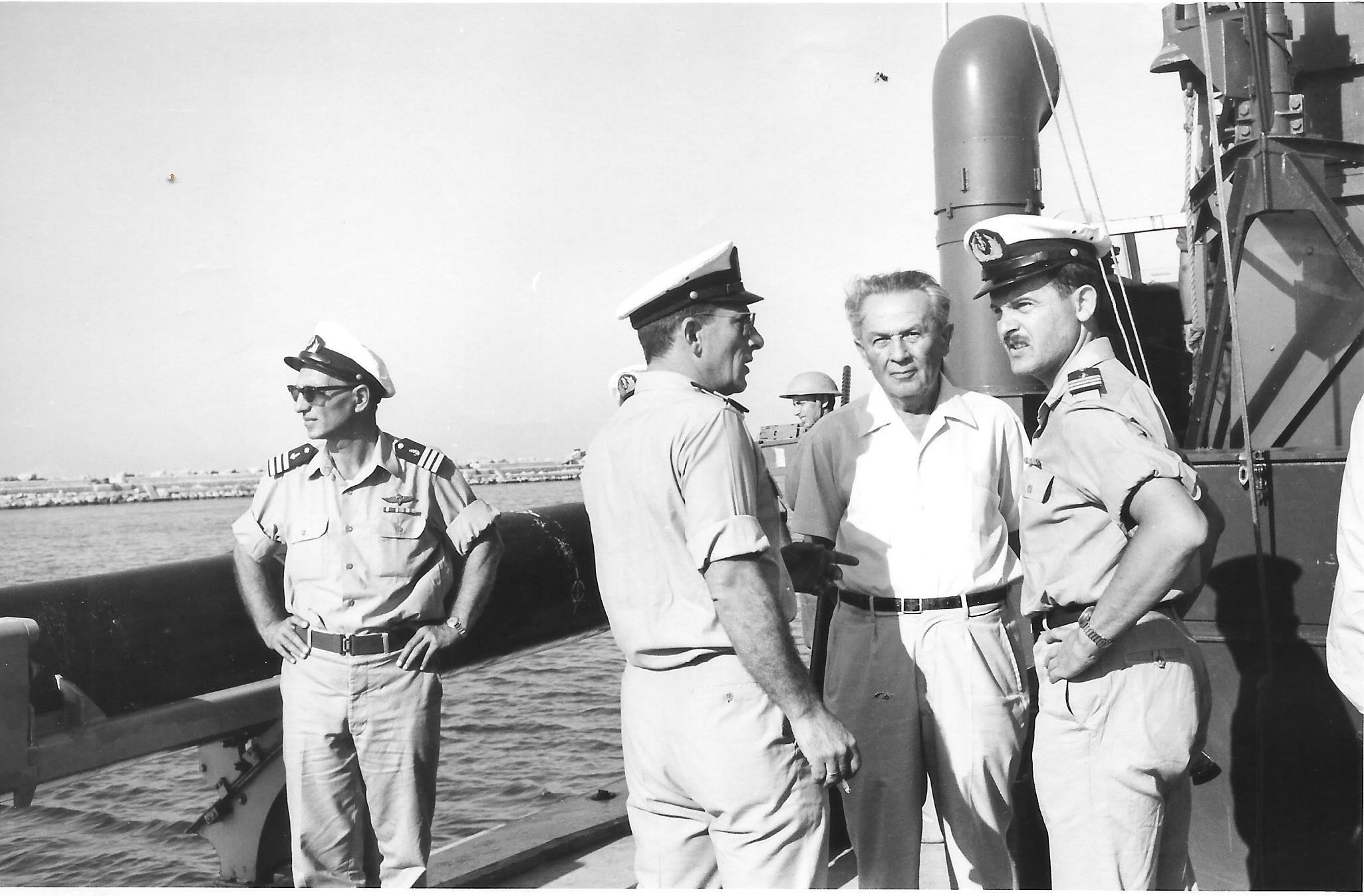 מפגש מפקד חיל הים שלמה אראל עם ראש עירית חיפה אבא חושי